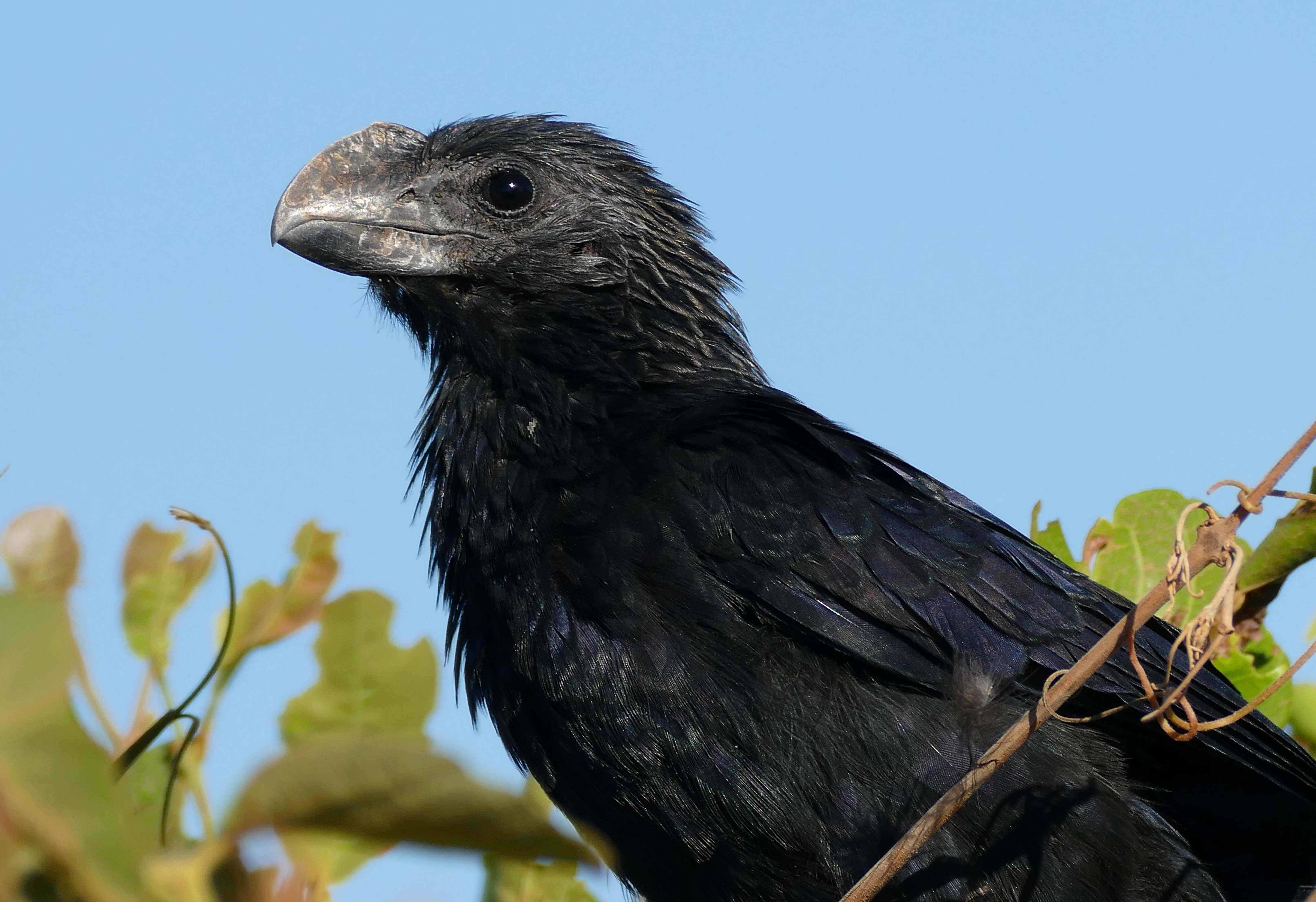 Transpantaneira, Poconé, Mato Grosso, BRAZIL